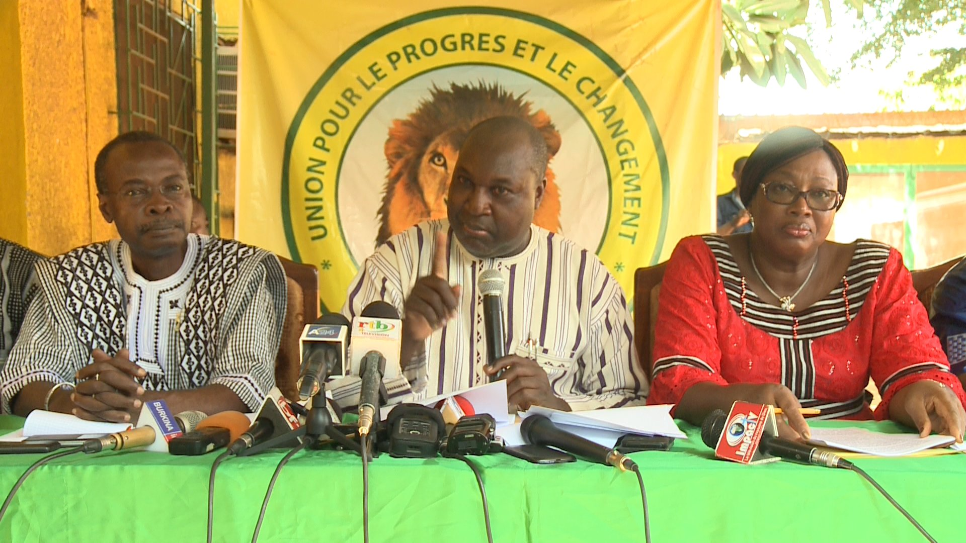 L’opposant Zéphirin Diabré, leader de l’Union pour le Progrès et le Changement (UPC), entouré de ses collaborateurs, lors d’une conférence de presse, à Ouagadougou, Burkina, 10 octobre 2017.